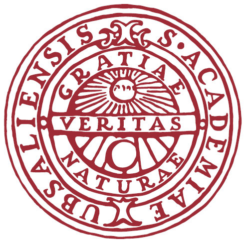 Uppsala universitets sigill